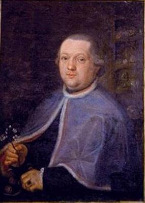 Ritratto di Giambattista Guatteri (1739-1793), fondatore dell'Orto Botanico di Parma.